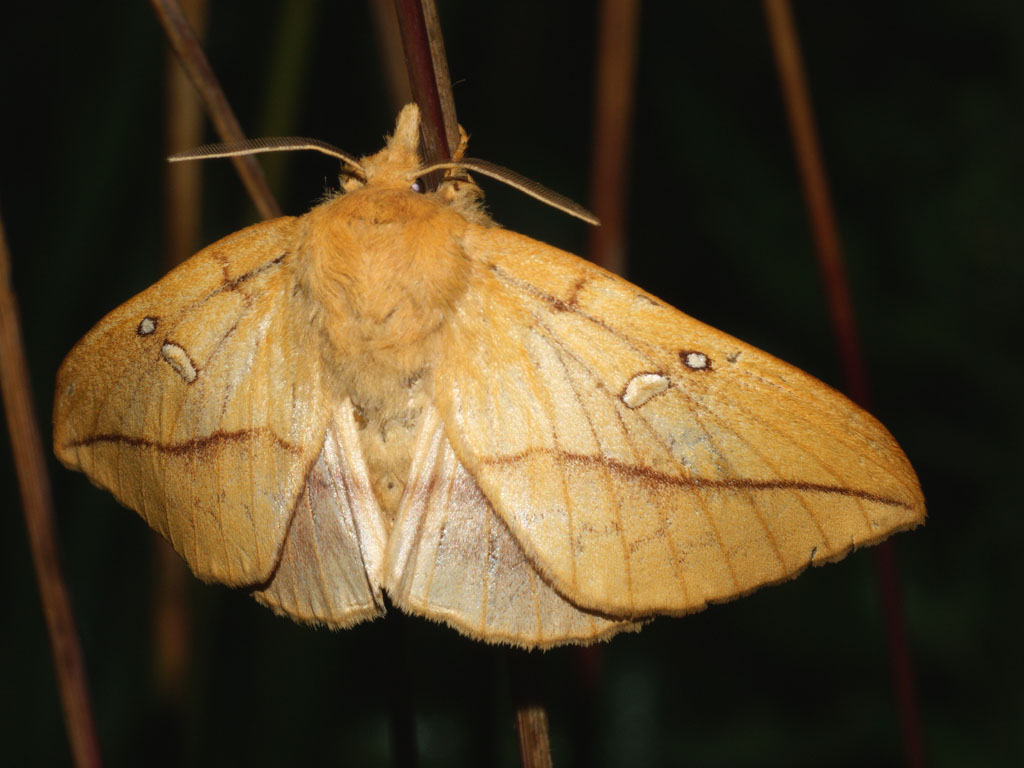 Exemplar found: Russia, Moscow Oblast, Orekhovo-Zuyevsky District, near station Antsiferovo, 20.07.2009, by light МО, Орехово-Зуевский р-н, окрестности станции Анциферово, 20.07.2009, на свет